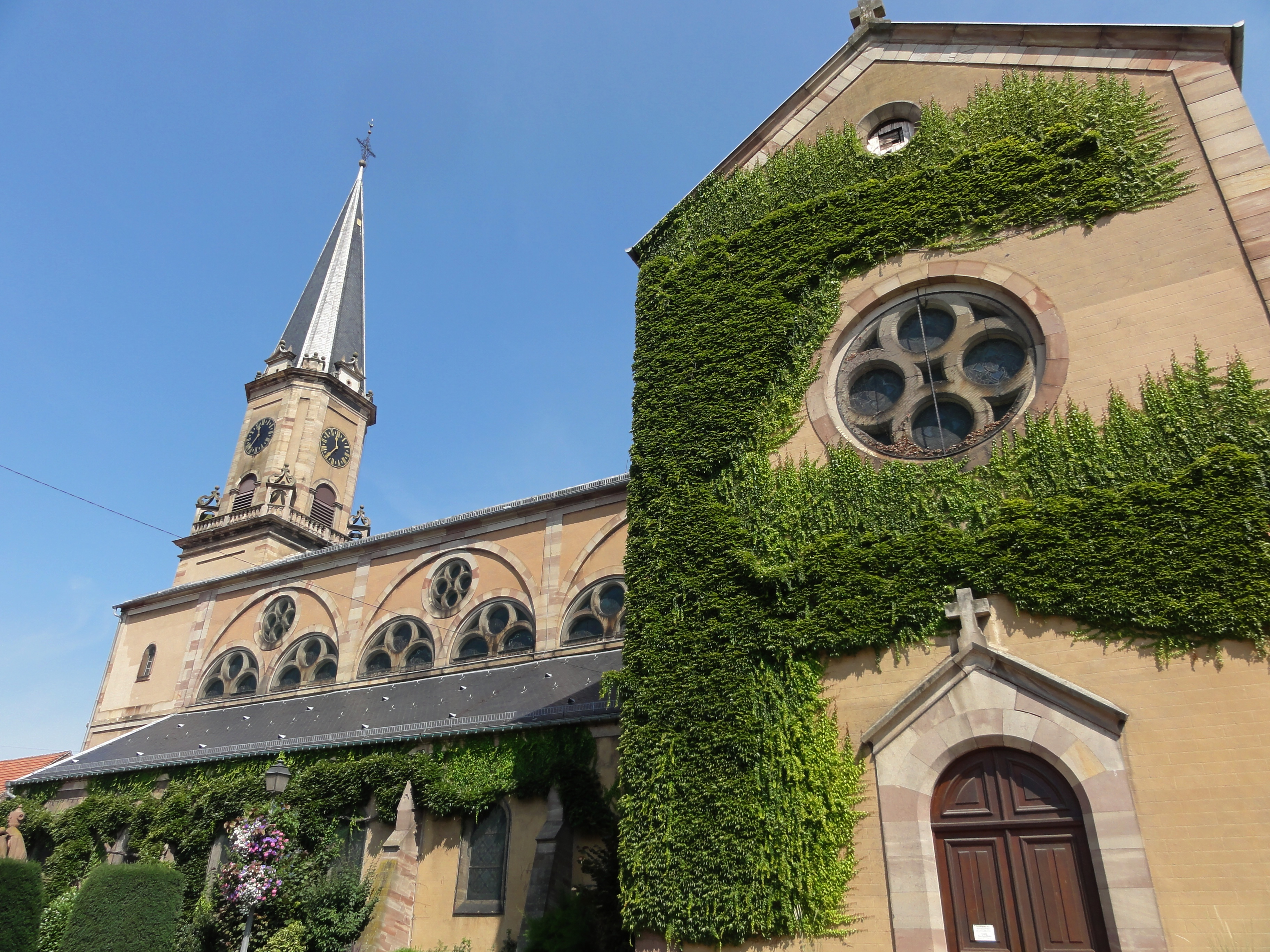 Alsace, Bas-Rhin, Église Saint-Martin d'Erstein (IA00023232).